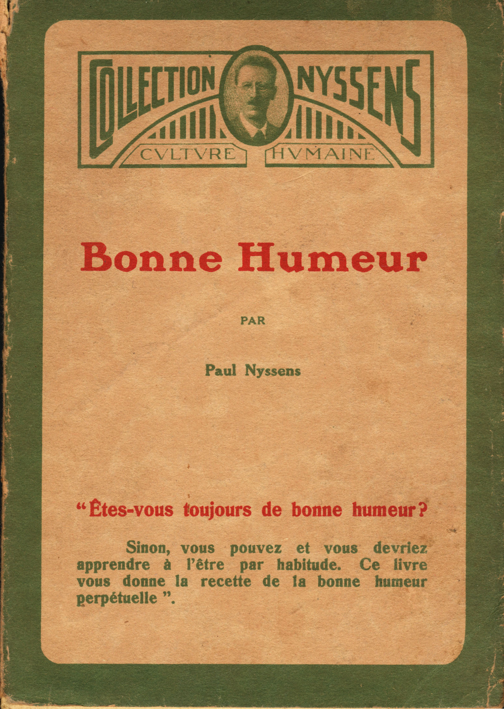 Numérisation de la couverture d'un livre de Mr Paul Nyssens